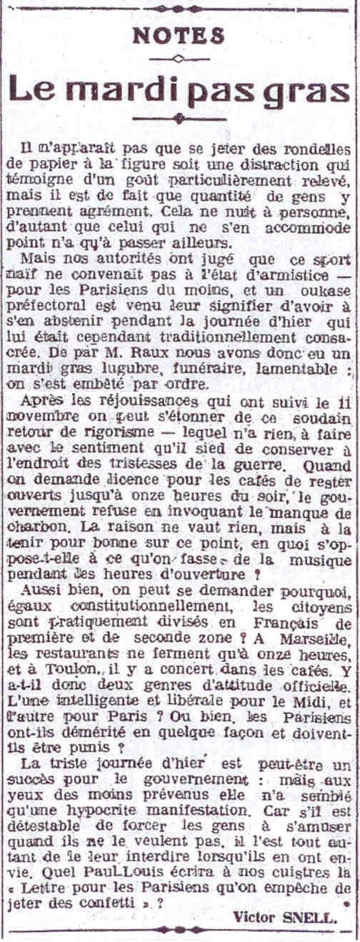 Le mercredi 5 mars 19119, Victor Snell, en première page de l'Humanité, s'élève vigoureusement contre l'interdiction des confettis à Paris et la répression du Carnaval de Paris.